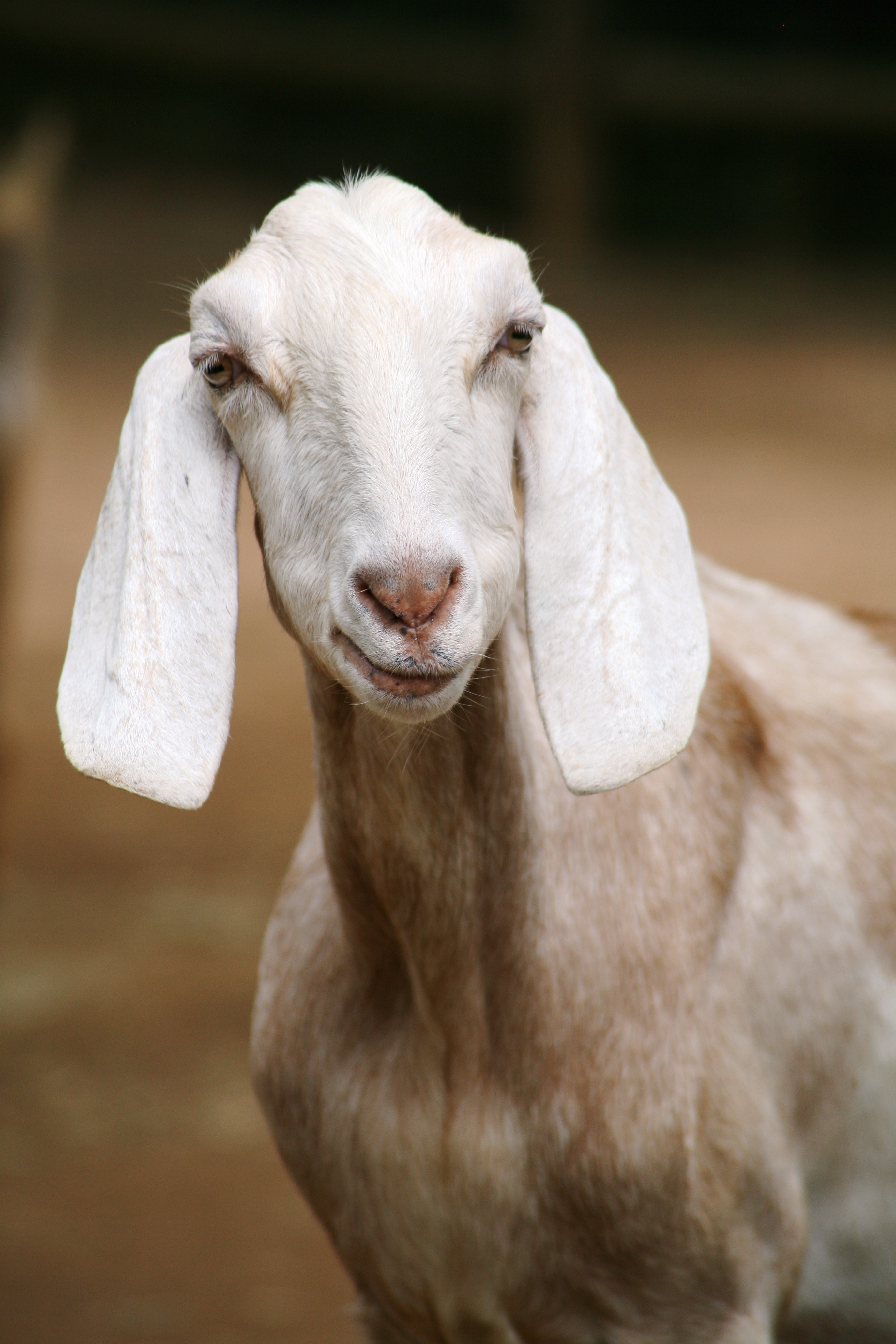 goat